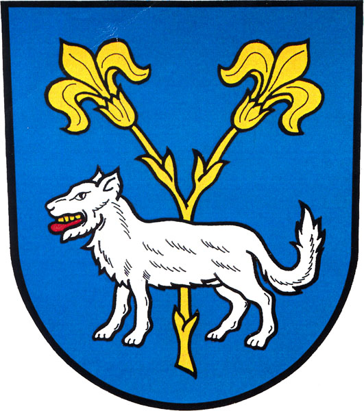 Znak obce Václavov u Bruntálu